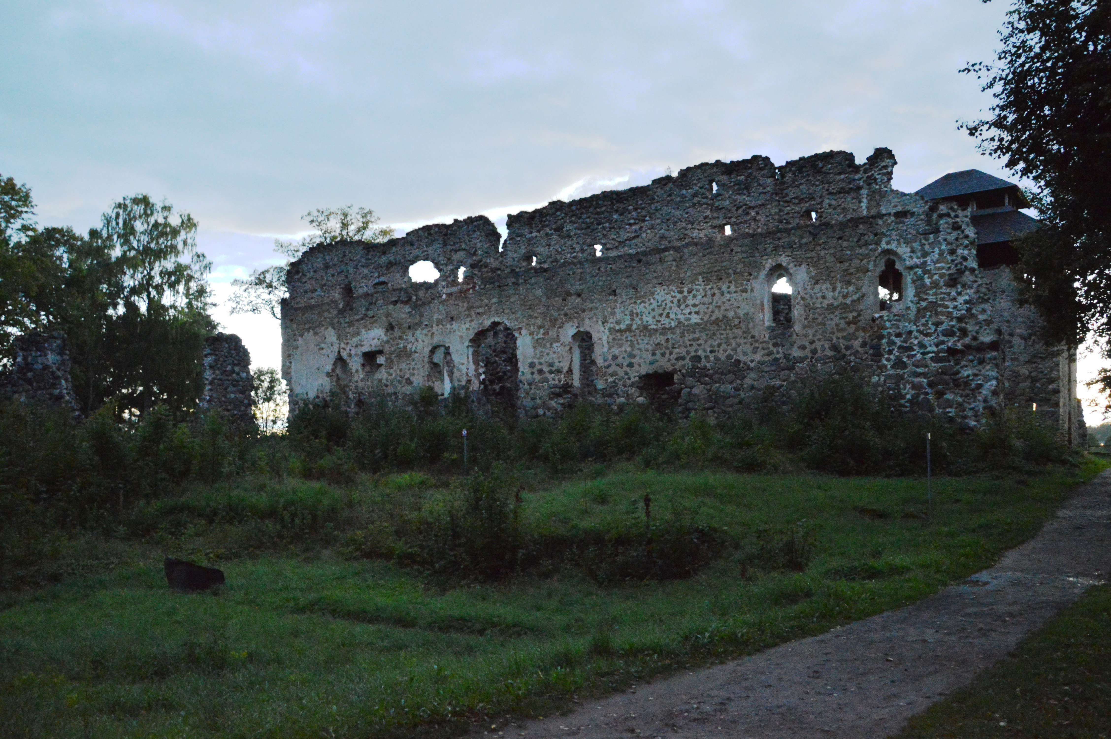 Rauna piiskopilinnus. Pilt on tehtud läänesuunda.